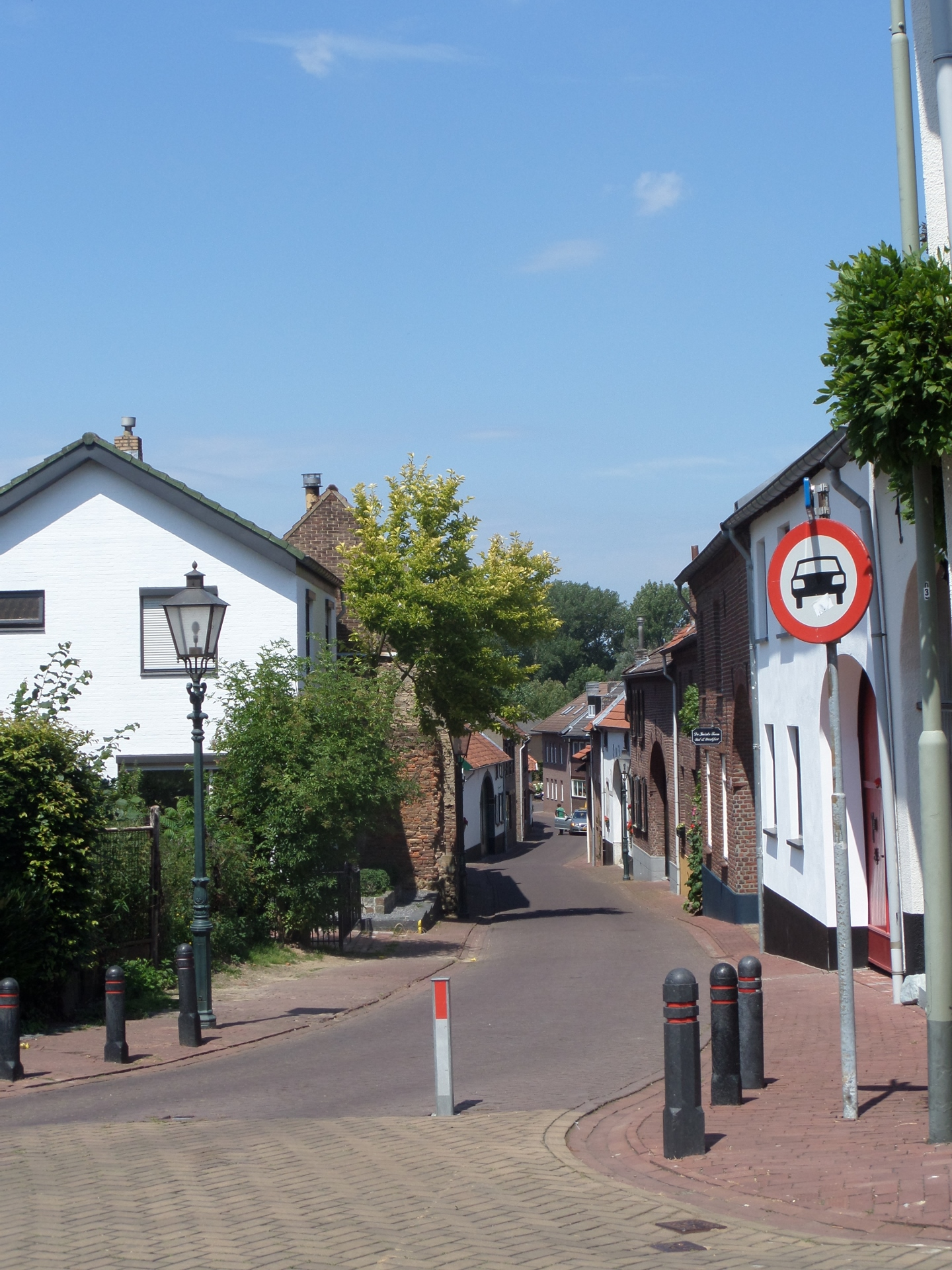 Oude huizen en boerderijen langs de Broekstraat in Leyenbroek